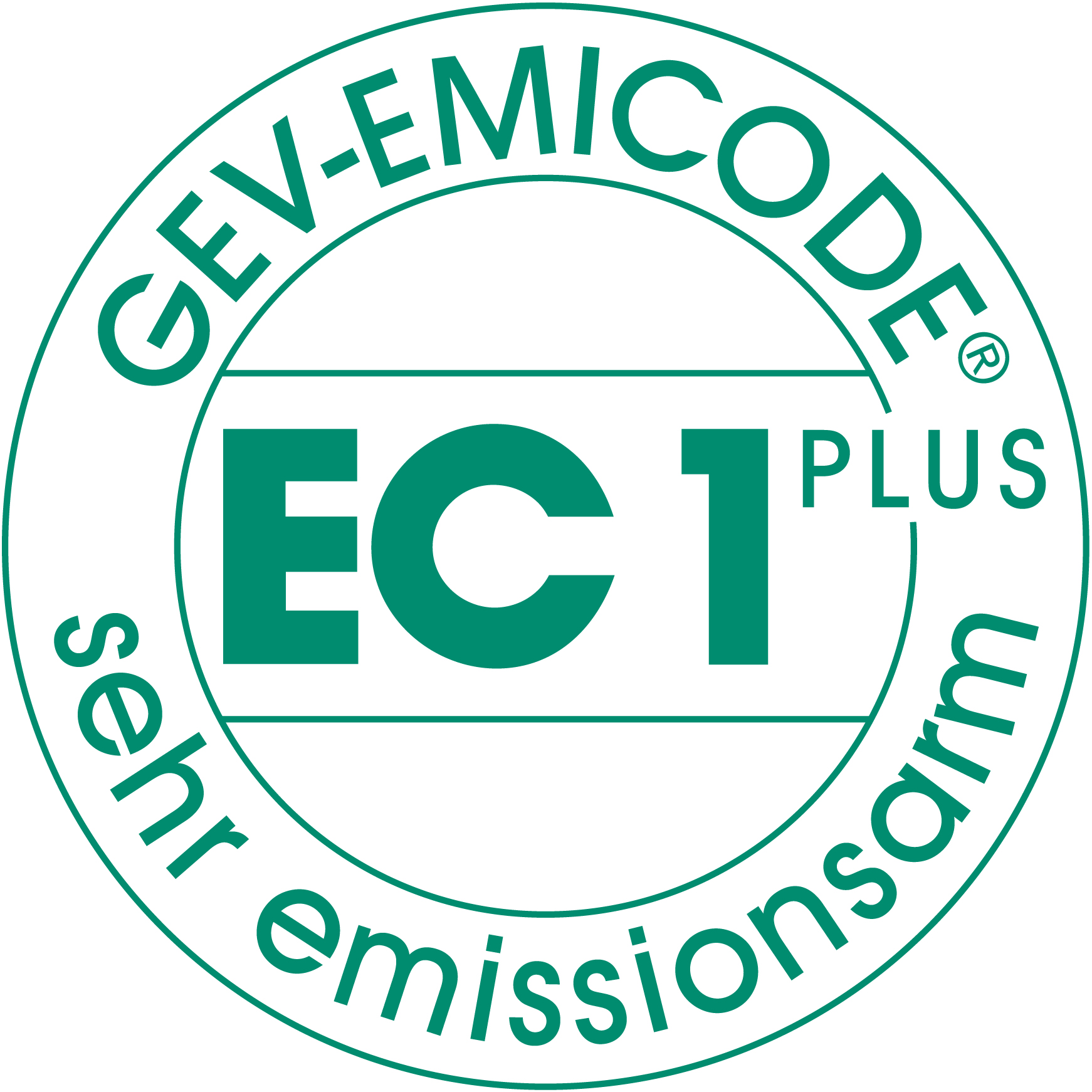 Emicode EC1 plus Siegel